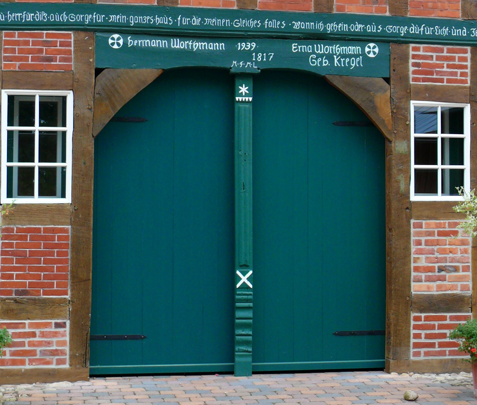 Eingangstor zum Mehrgenerationenhaus in Waffensen/Rotenburg (Wümme)